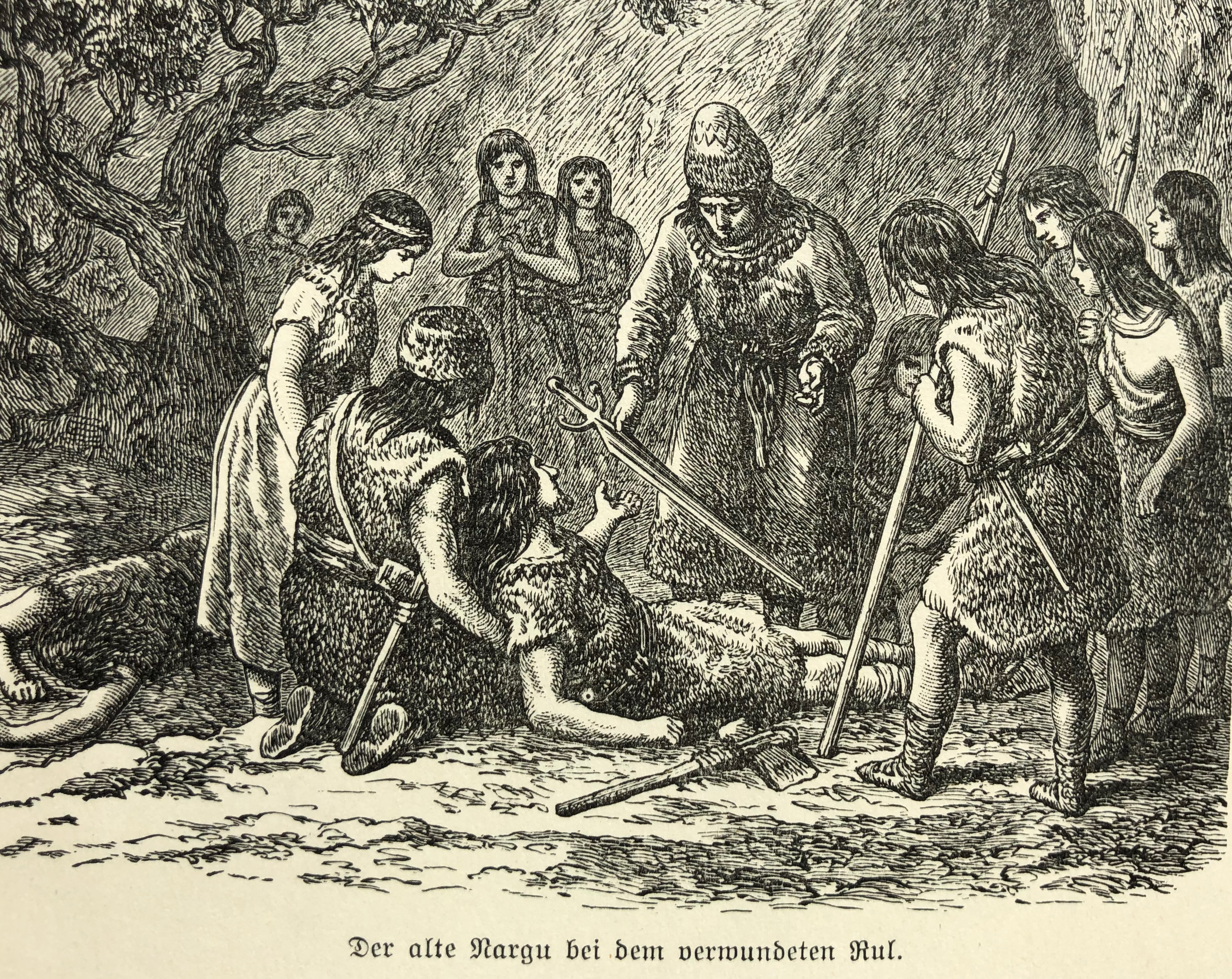 Illustrationen von Heinrich Leutemann aus dem Buch "Rulaman" von David Friedrich Weinland.